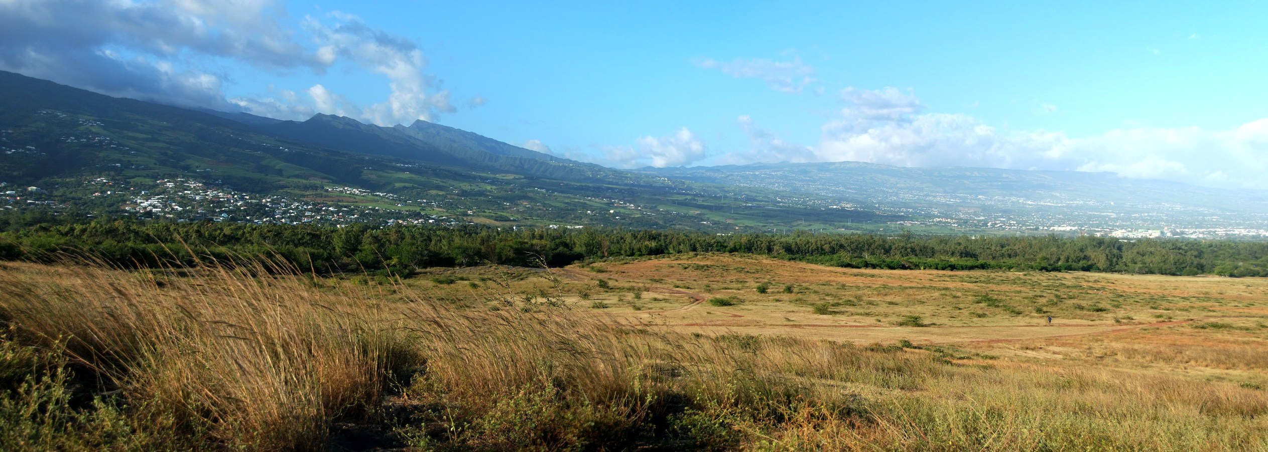 la foret de l'etang salé et l'aire de parachutage